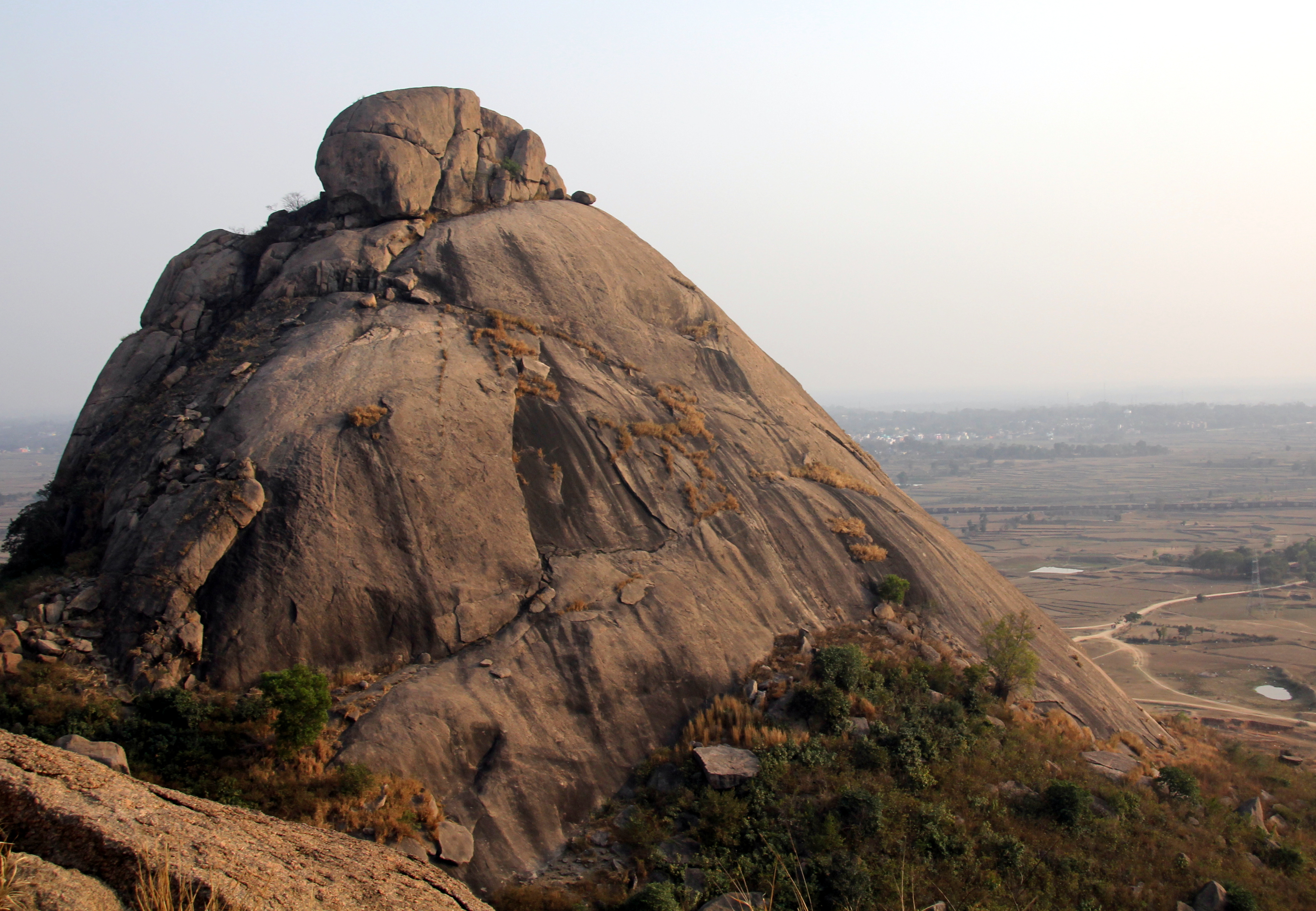 Joychandi Pahar